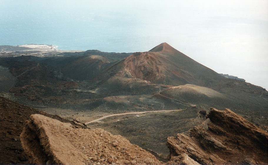 Quelle: selbst fotografiert Datum: März 1999